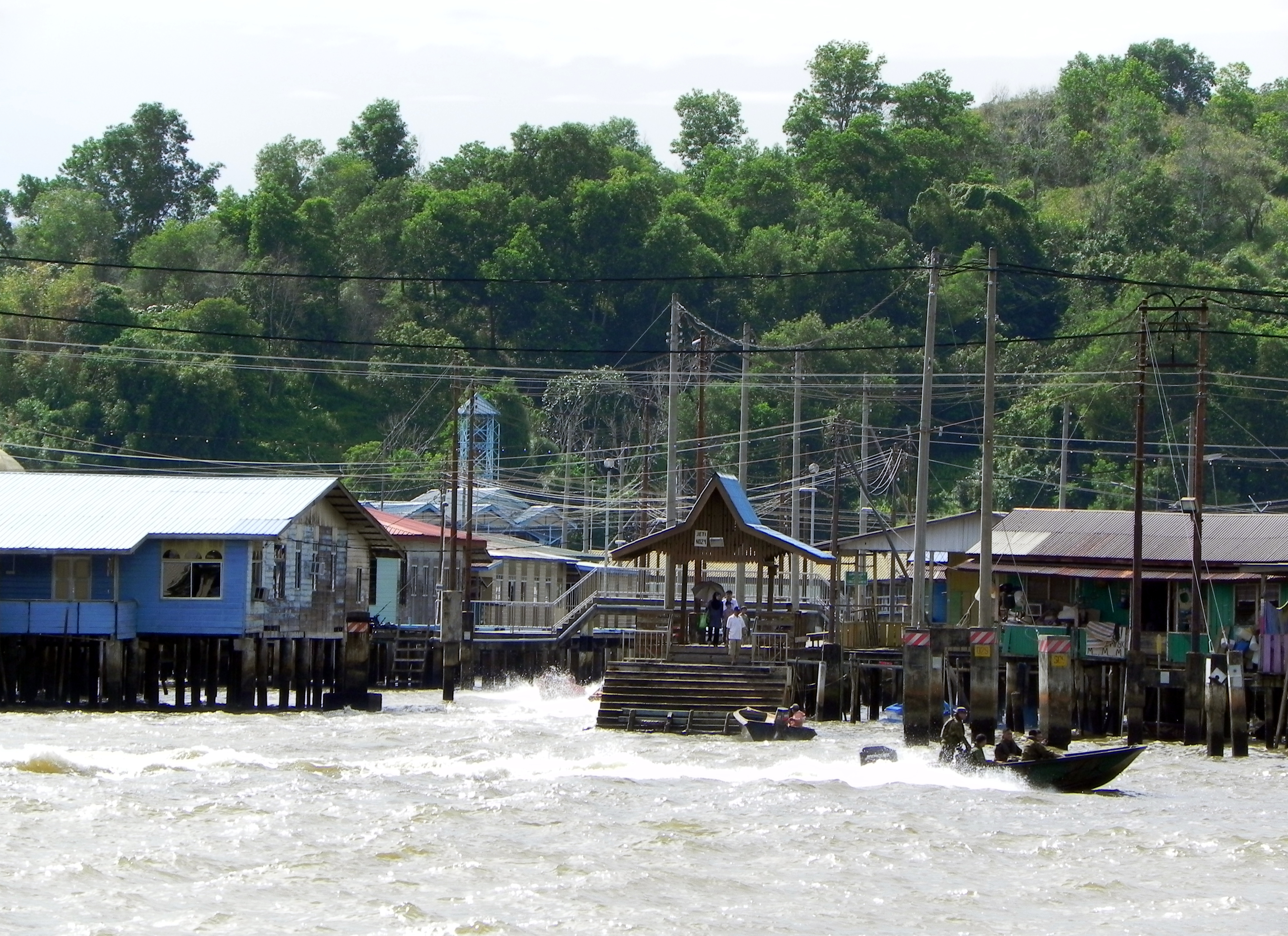 Pfahlhäuser im einem der 30 Wasserdörfer von Kampong Ayer, in dem etwa 32.000 Menschen leben.